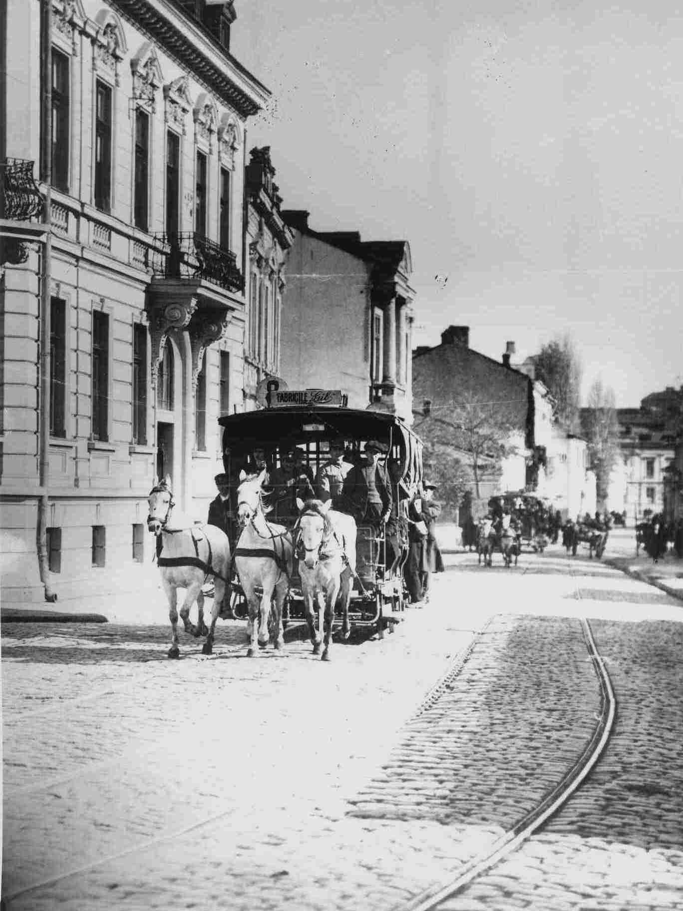 Tramvai cu cai pe strada Stirbey Voda